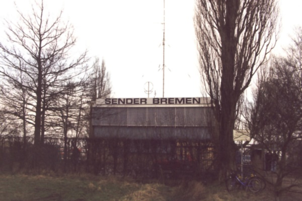 Sender Radio Bremen im Leher Feld, Sendegebäude